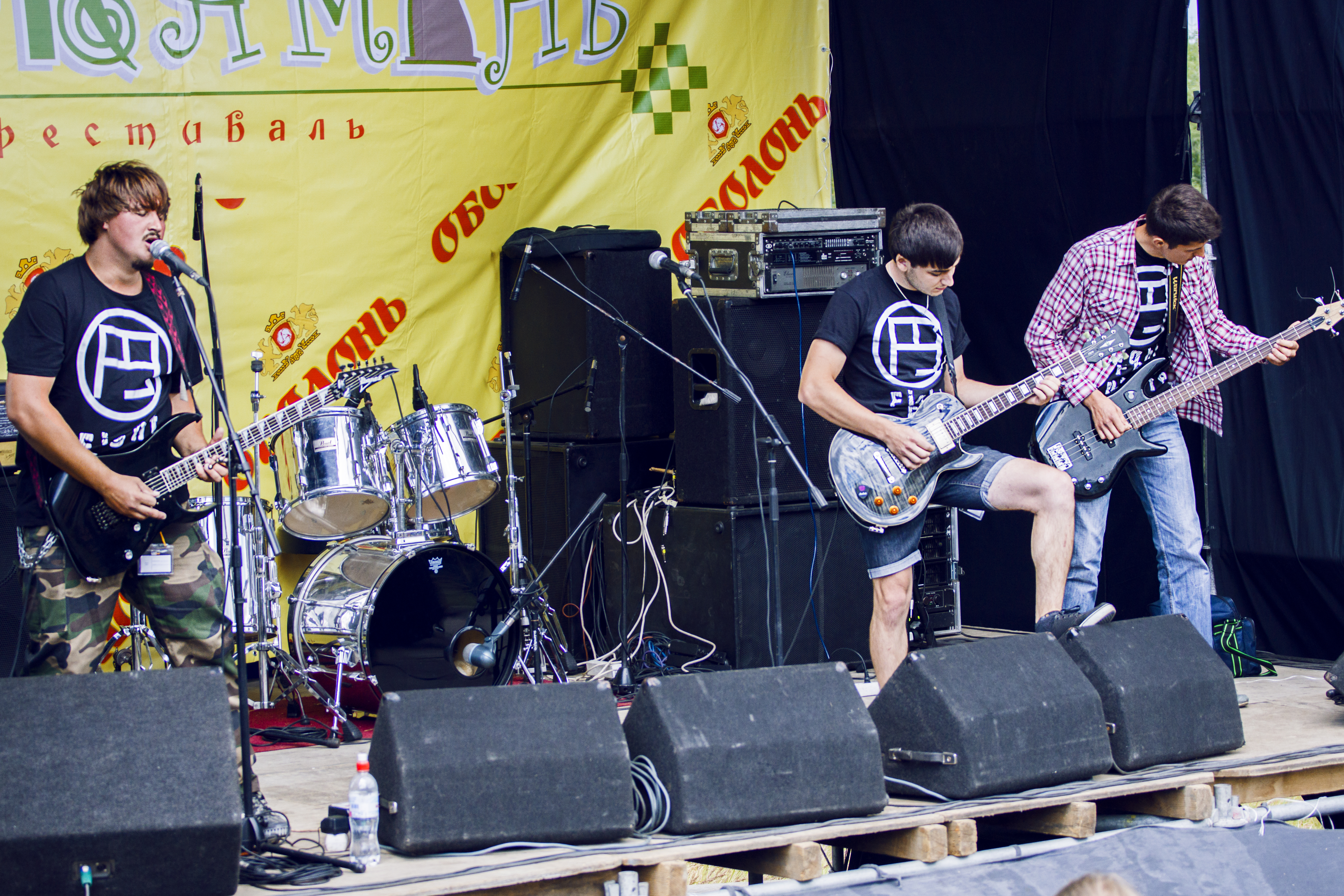 Fight For Future на денній сцені фестивалю Підкамінь-2013 (21 липня)